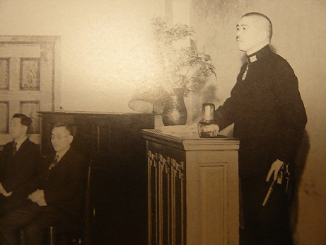 青木 大吉は、税理士、公認会計士。大日本帝国海軍の軍人。